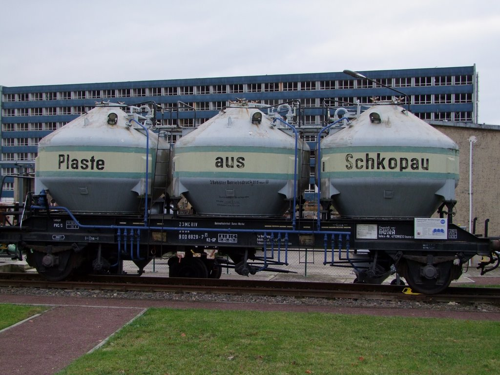 Standort(2015): Chemiemuseum Merseburg